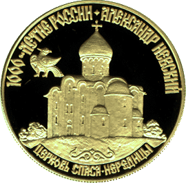 Монета Банка России — «Историческая серия», Александр Невский, Церковь Спаса-Нередицы, 50 рублей, реверс